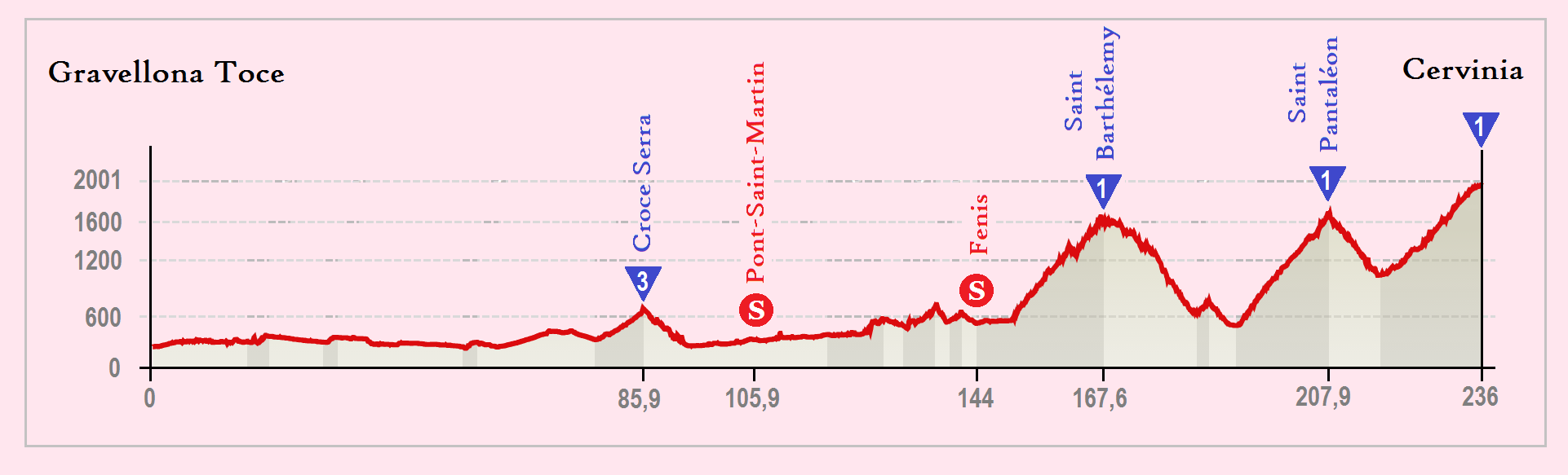 Perfil de la 19.ª etapa del Giro de Italia 2015